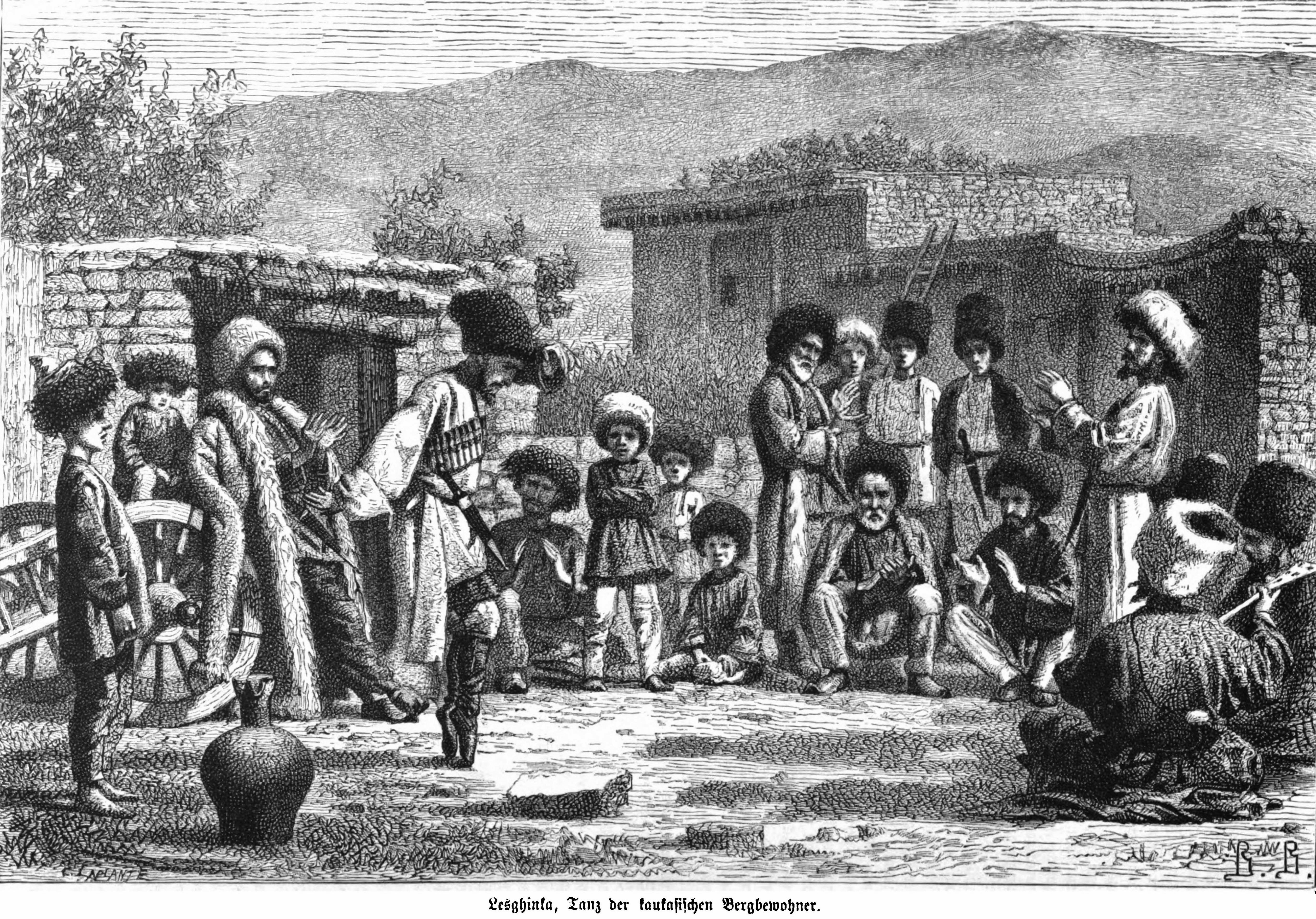 Lezginka. Globus: illustrierte Zeitschrift für Länder- und Völkerkunde